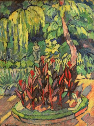 In giardino